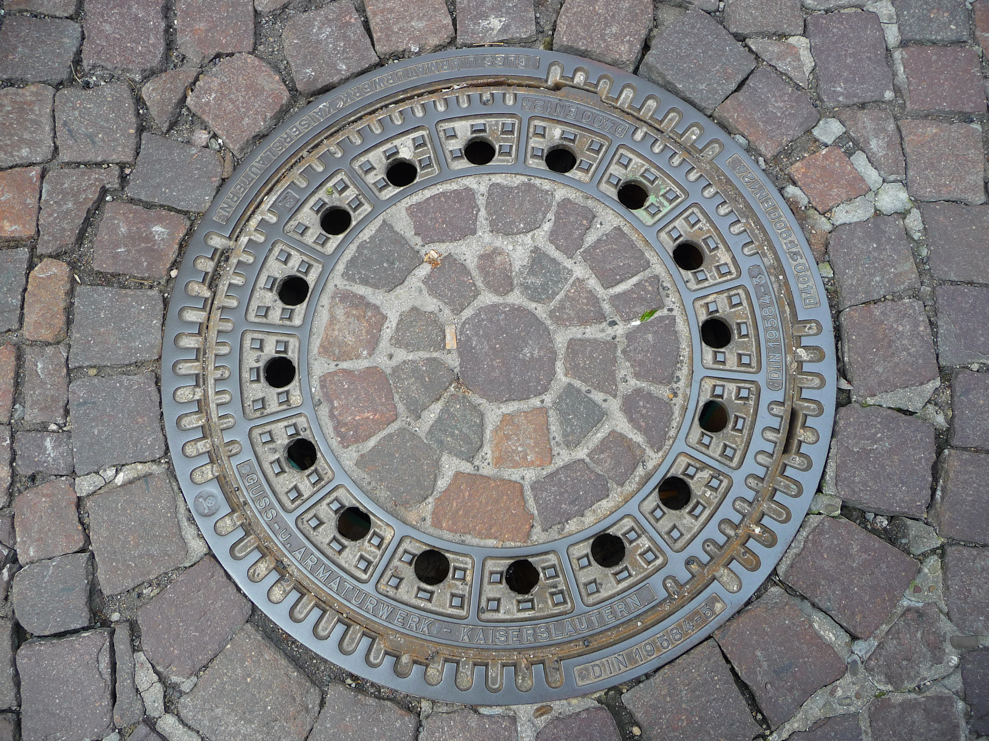 Kanaldeckel in Baden-Baden (Hersteller Guß- und Armaturwerk Kaiserslautern), nach DIN 19584-5